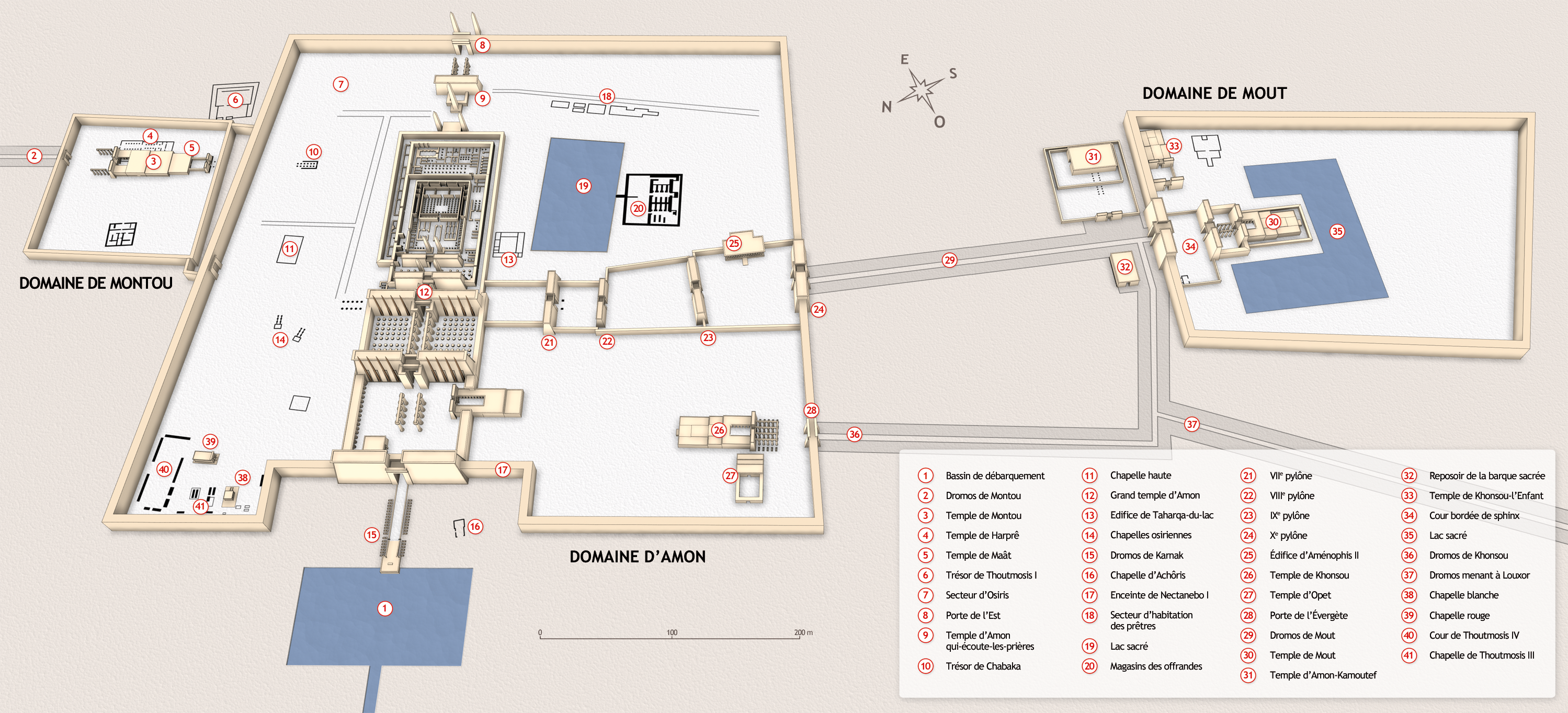 Plan 3D du site de Karnak, avec le domaine de Montou, le domaine d'Amon et le domaine de Mout.